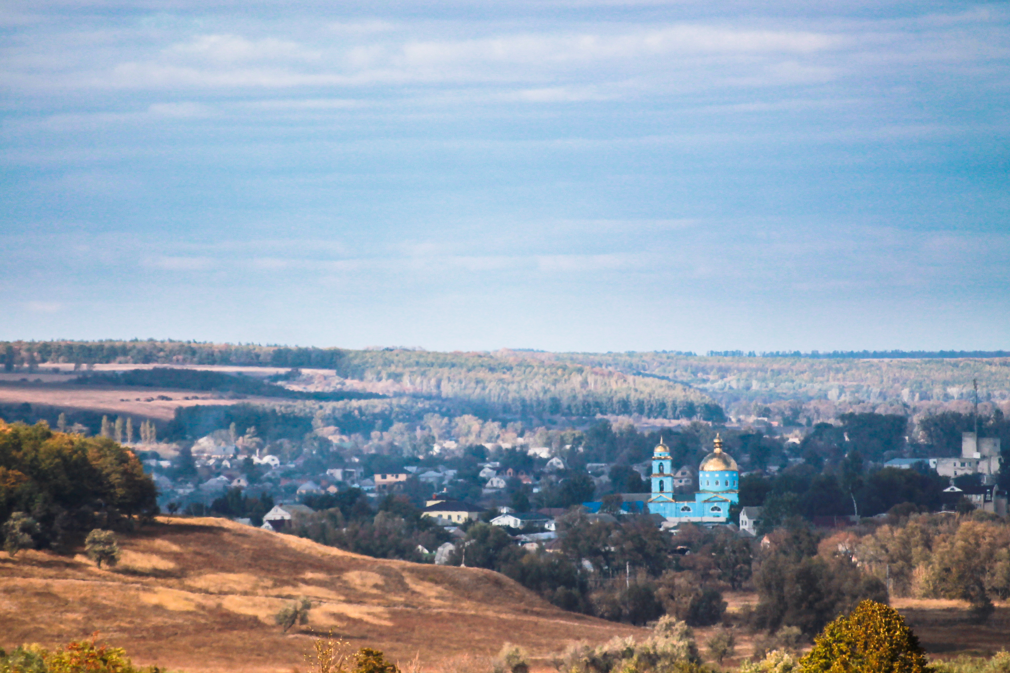 Пейзажне фото із видом на північно-західну частину міста Дергачі. На фото видно церкву Різдва Богородиці (голубого кольору) та районний будинок культури (правий край кадру). Фото зроблене зі схилу гори Січ (місцева назва) на західній околиці міста.